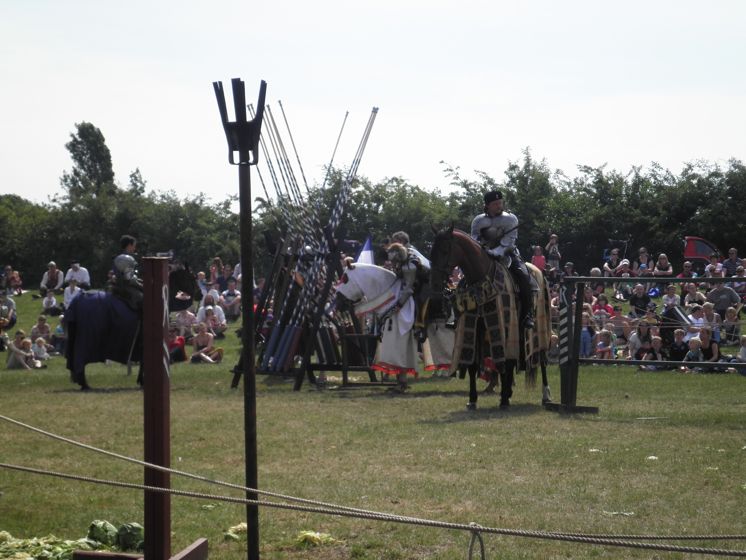 Folk klar til ridderturnering på Københavns Middelaldermarked 2011.